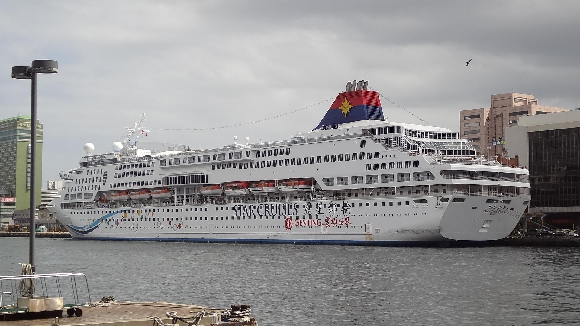 麗星郵輪寶瓶星號停泊基隆港東岸碼頭時的左舷外觀。